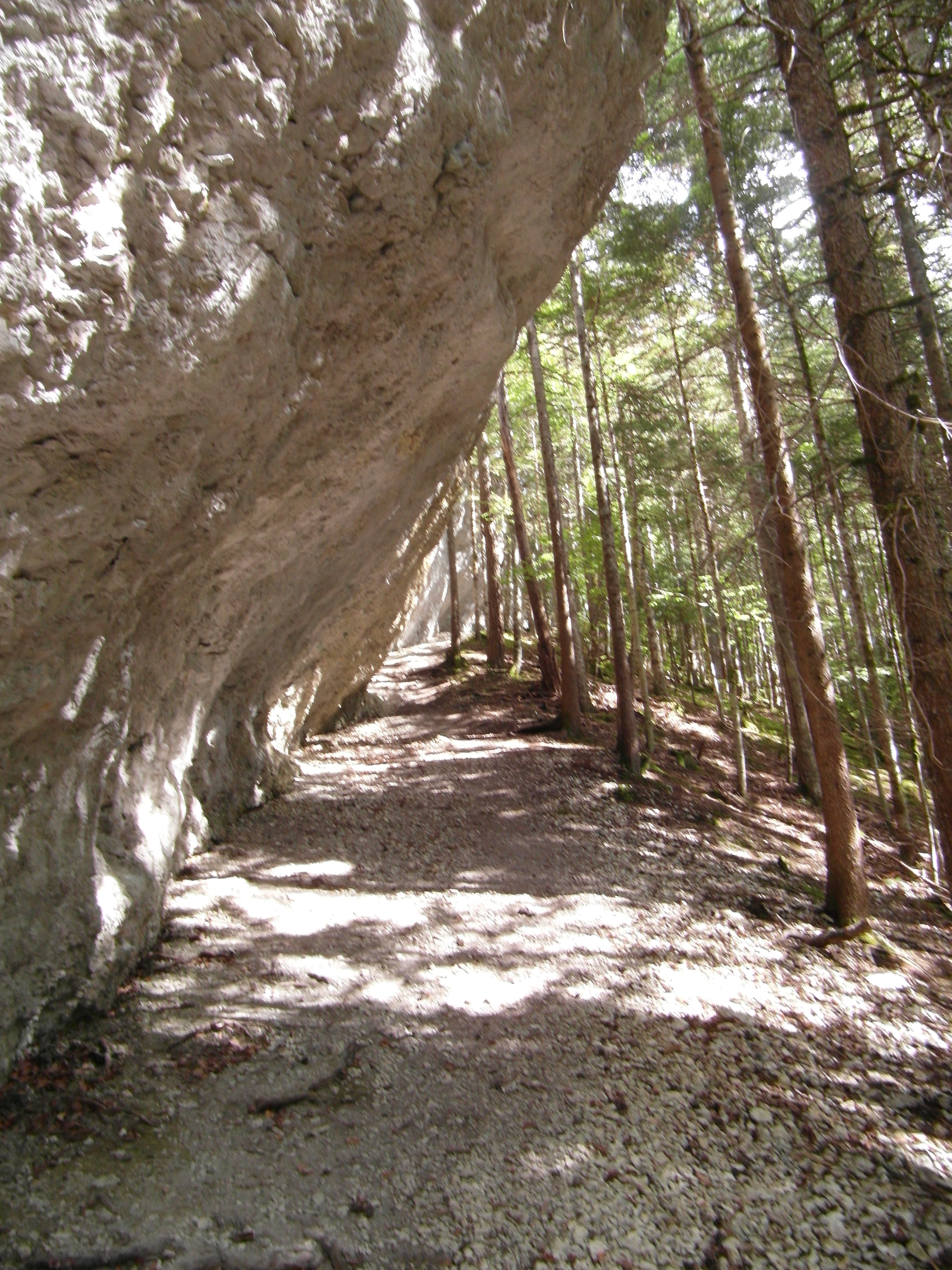 Combe du Bayle (près des Cochettes)